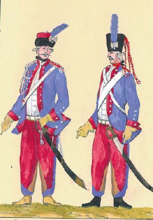 Towarzysz i szeregowy 1 Brygady Kawalerii Narodowej (Dzierżka)